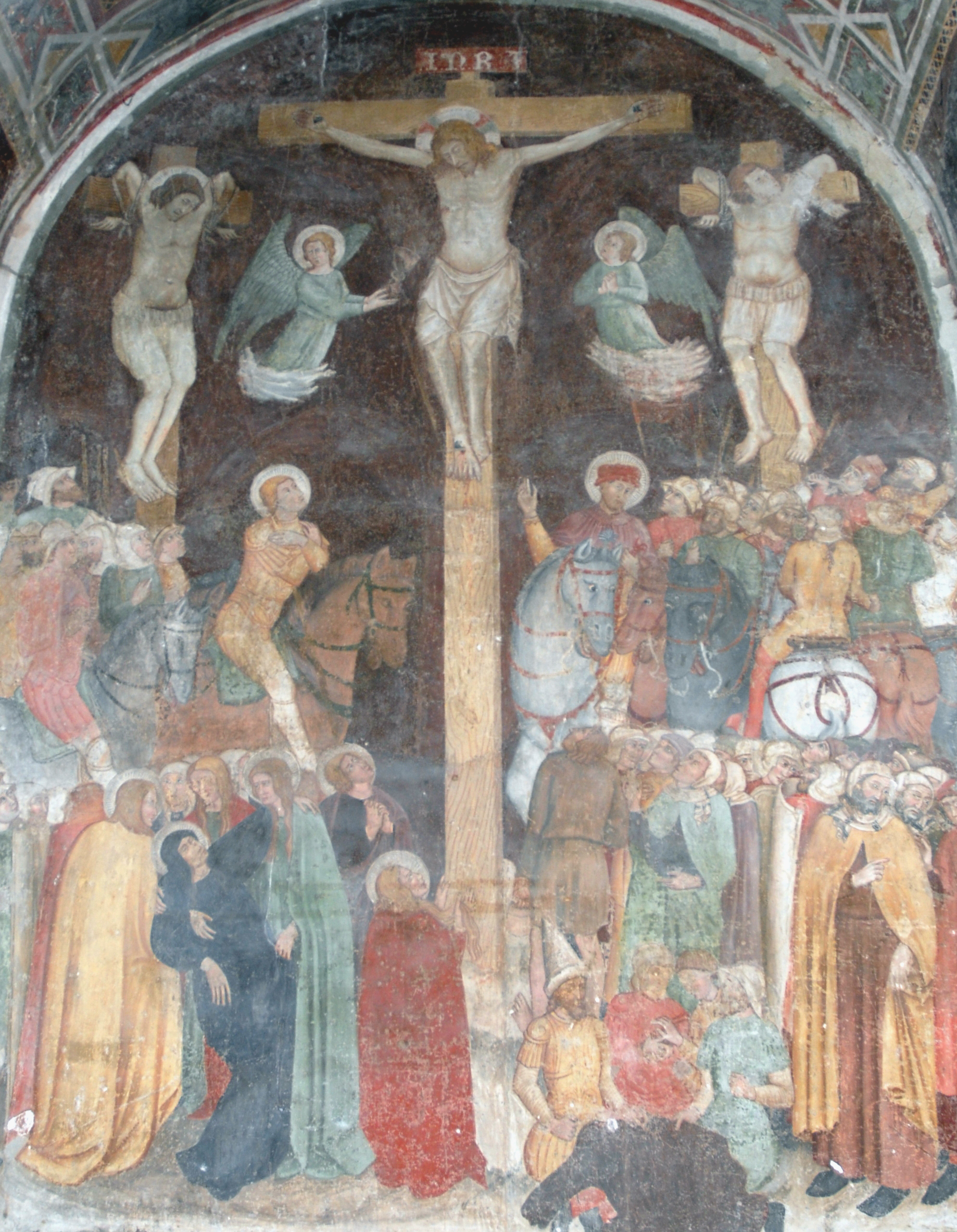 Chiesa di San Domenico Cappella di Santa Maria Maddalena